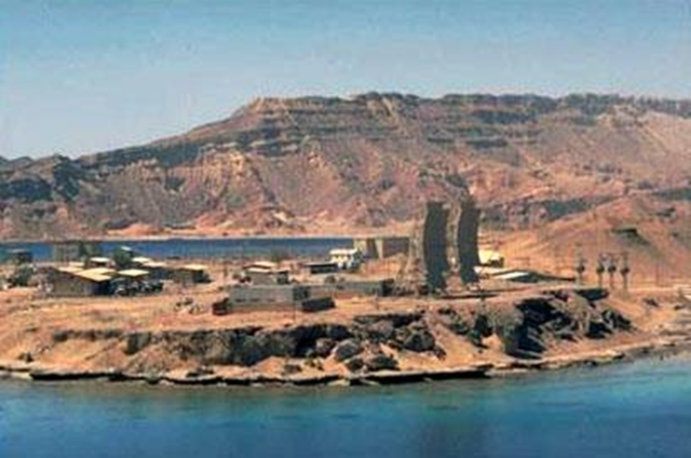 המחנה הצבאי בשארם א-שייח' וזוג אנטנות הקשר